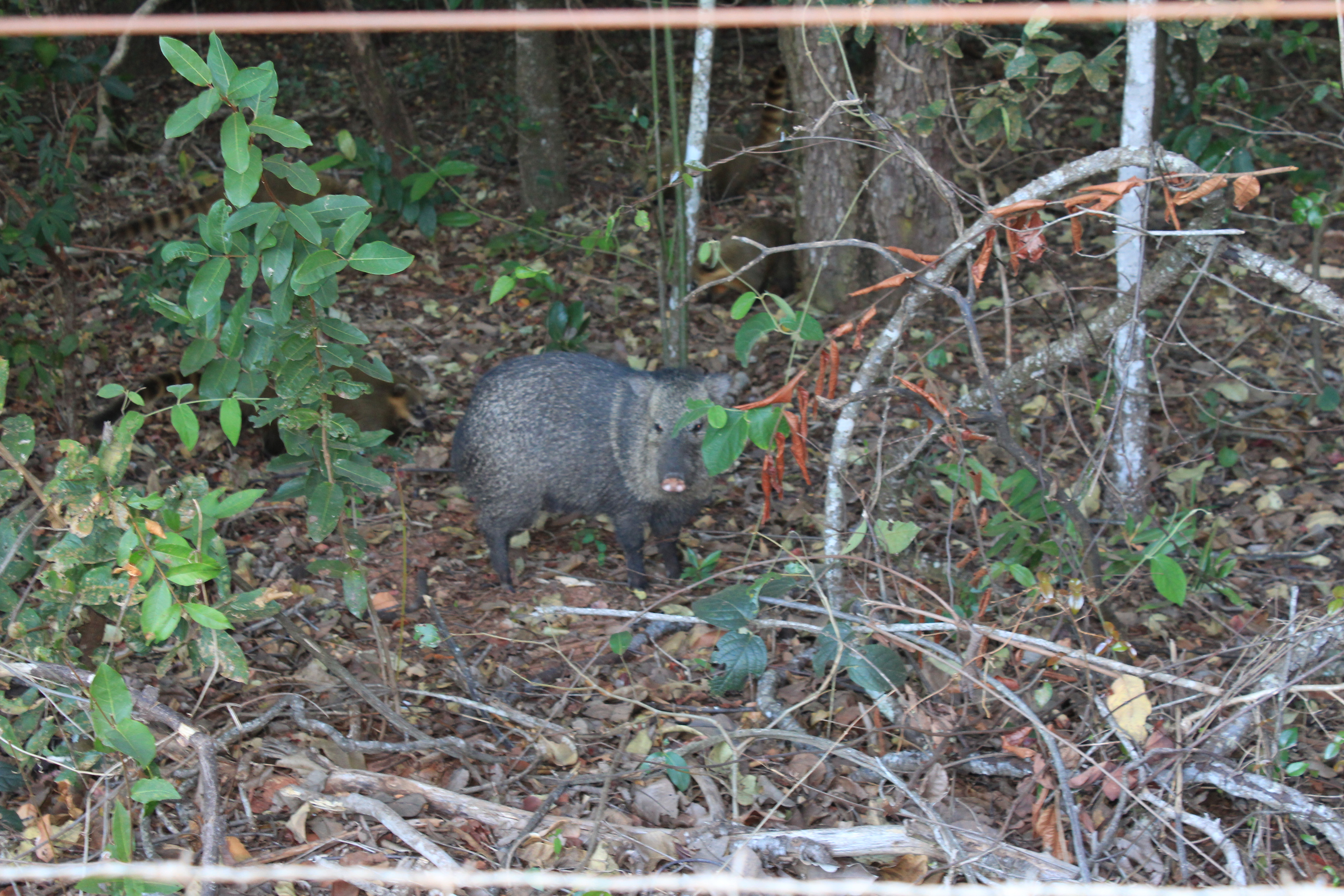 Cateto (Porco do mato) no Parque Estadual do Prosa